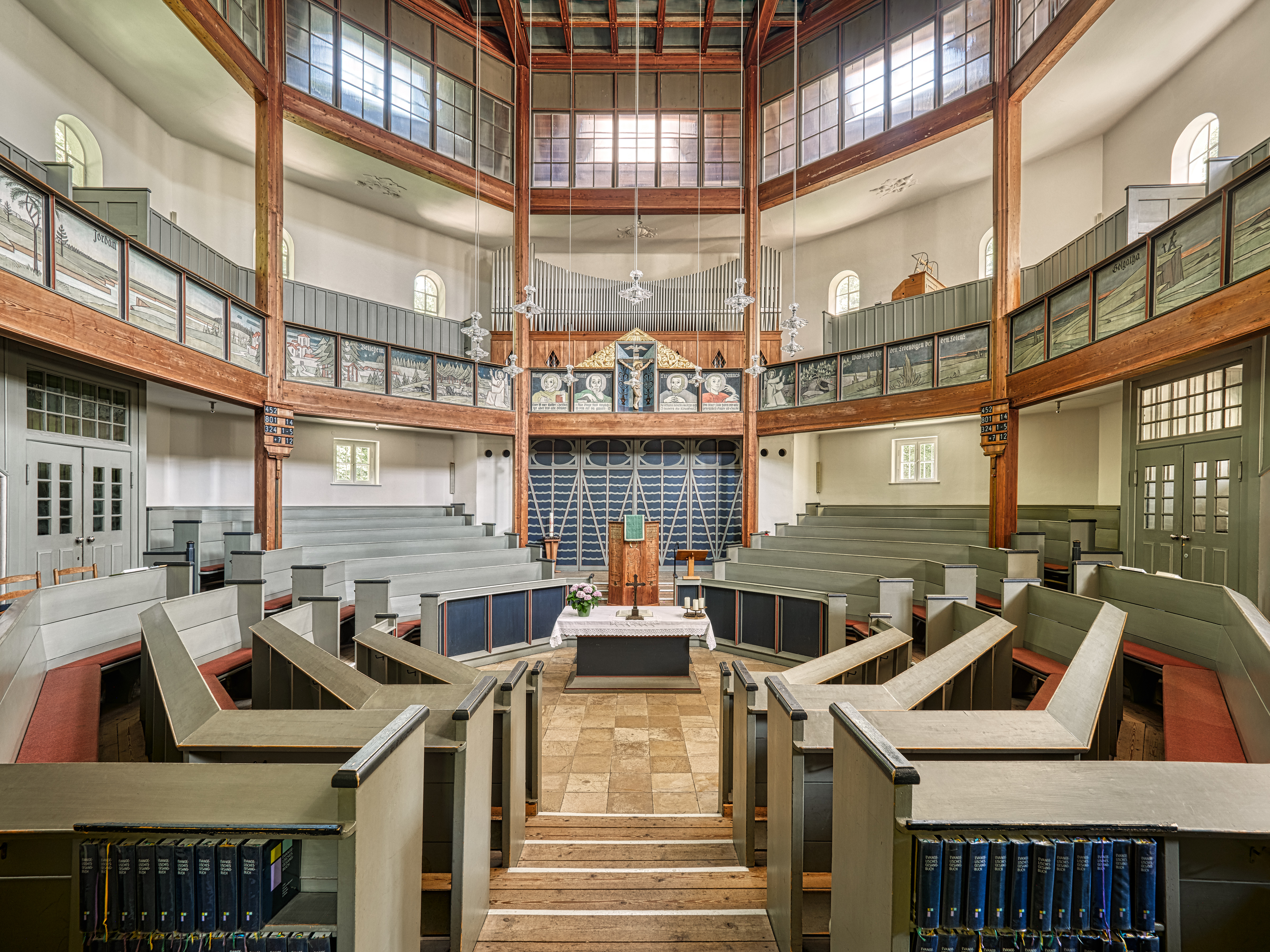 Moderner Kirchenbau mit Zeltdach. Der Gottesraum ist als amphitheatralisch vertiefter achteckiger Zentralbau angelegt, in dessen Mitte der Altar steht. Die Kirchenbänke sind nach hinten aufsteigend so angelegt, dass die Gläubigen den Altar umrahmen. Der Raum wird von einer achtseitigen Empore umfangen.This is a photograph of an architectural monument.